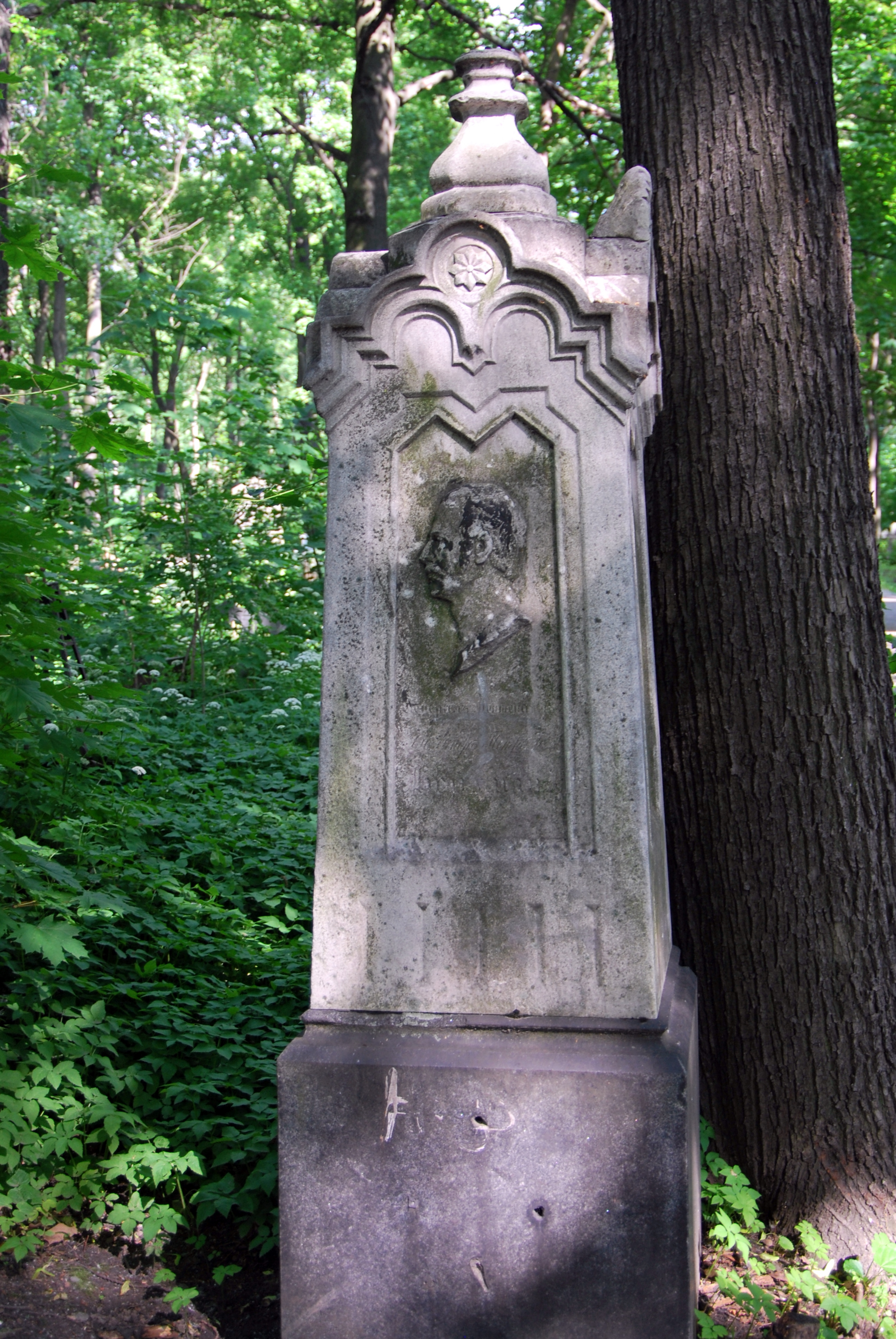 памятник